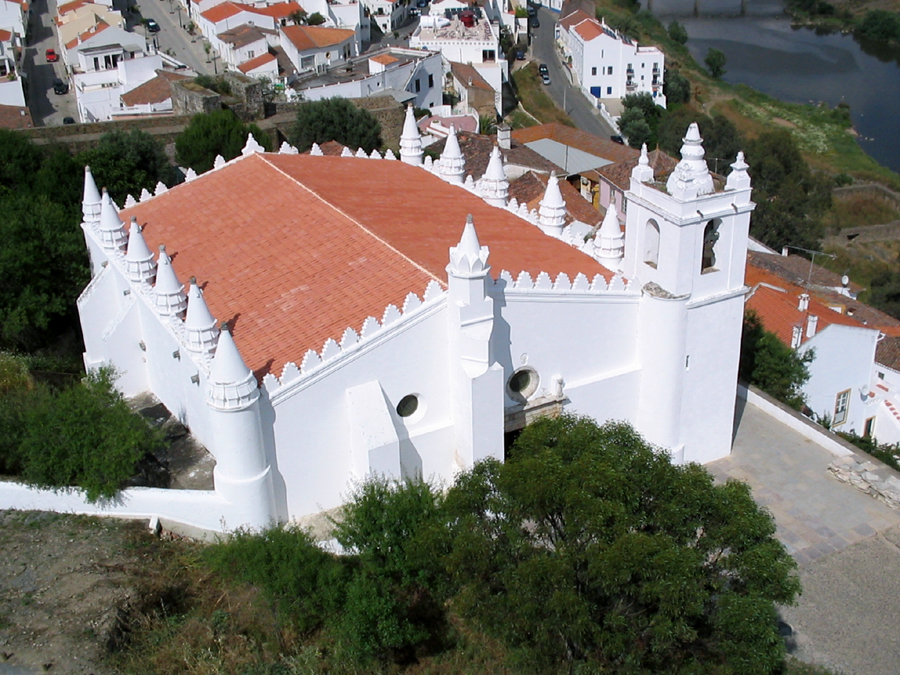 Igreja Matriz de Mértola